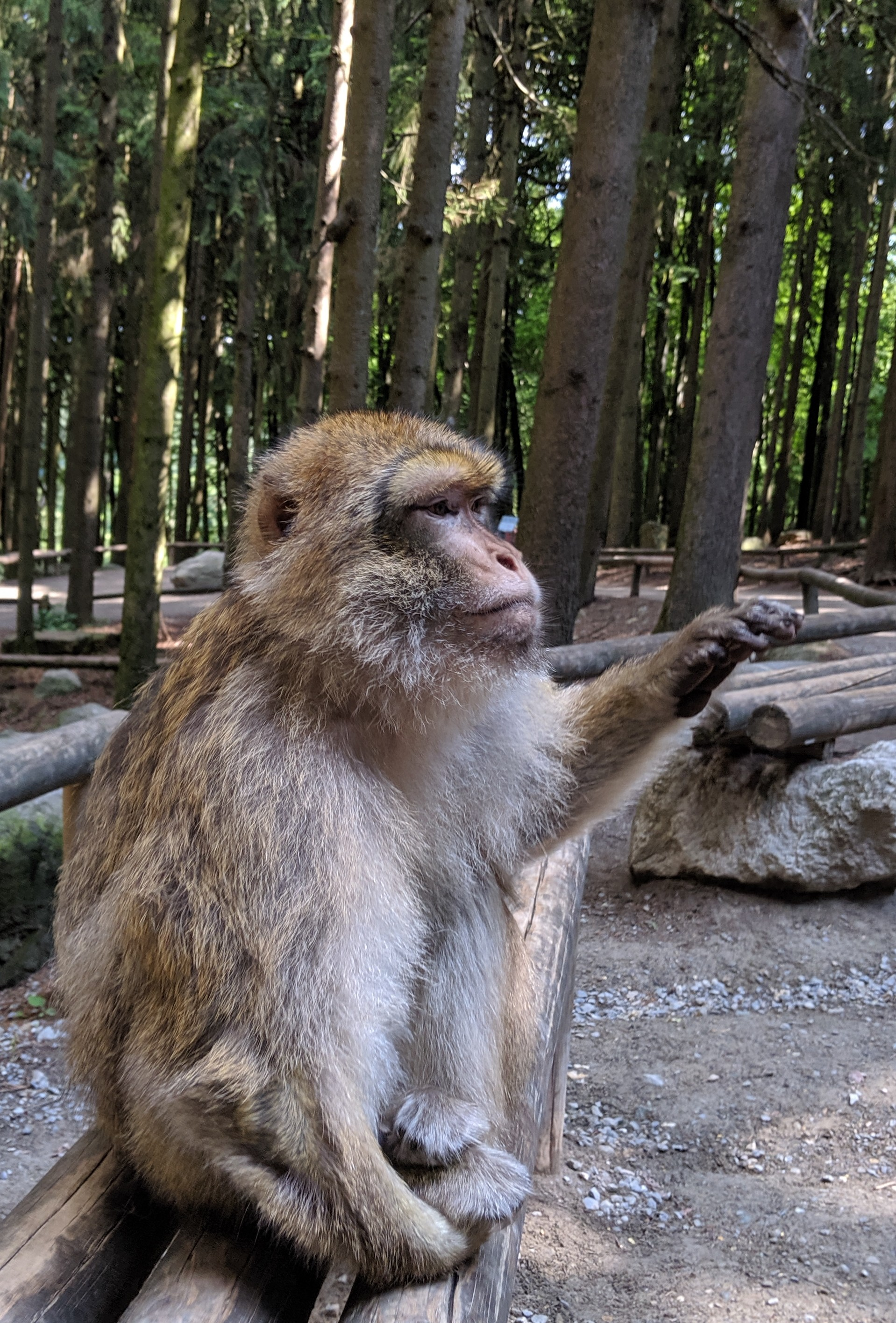 Affenberg Salem: Ein Affe bettelt nach Popcorn